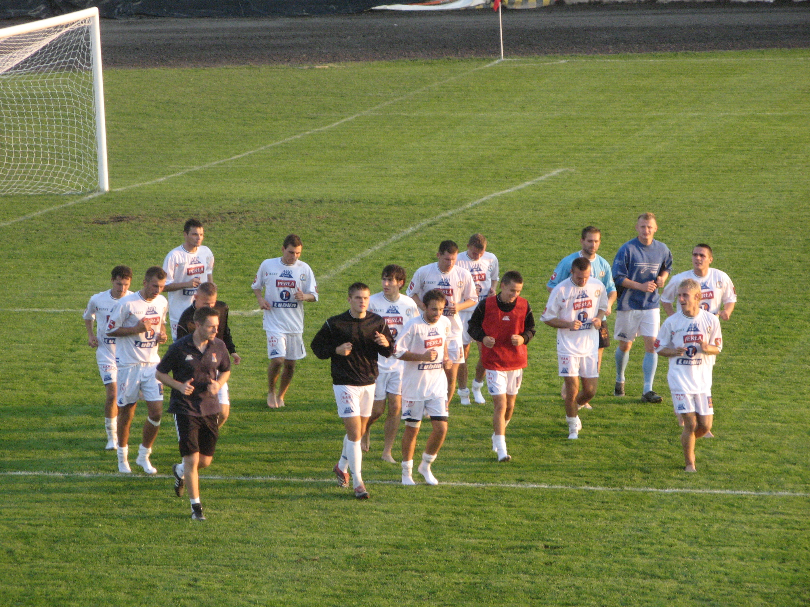 Motor Lublin po meczu